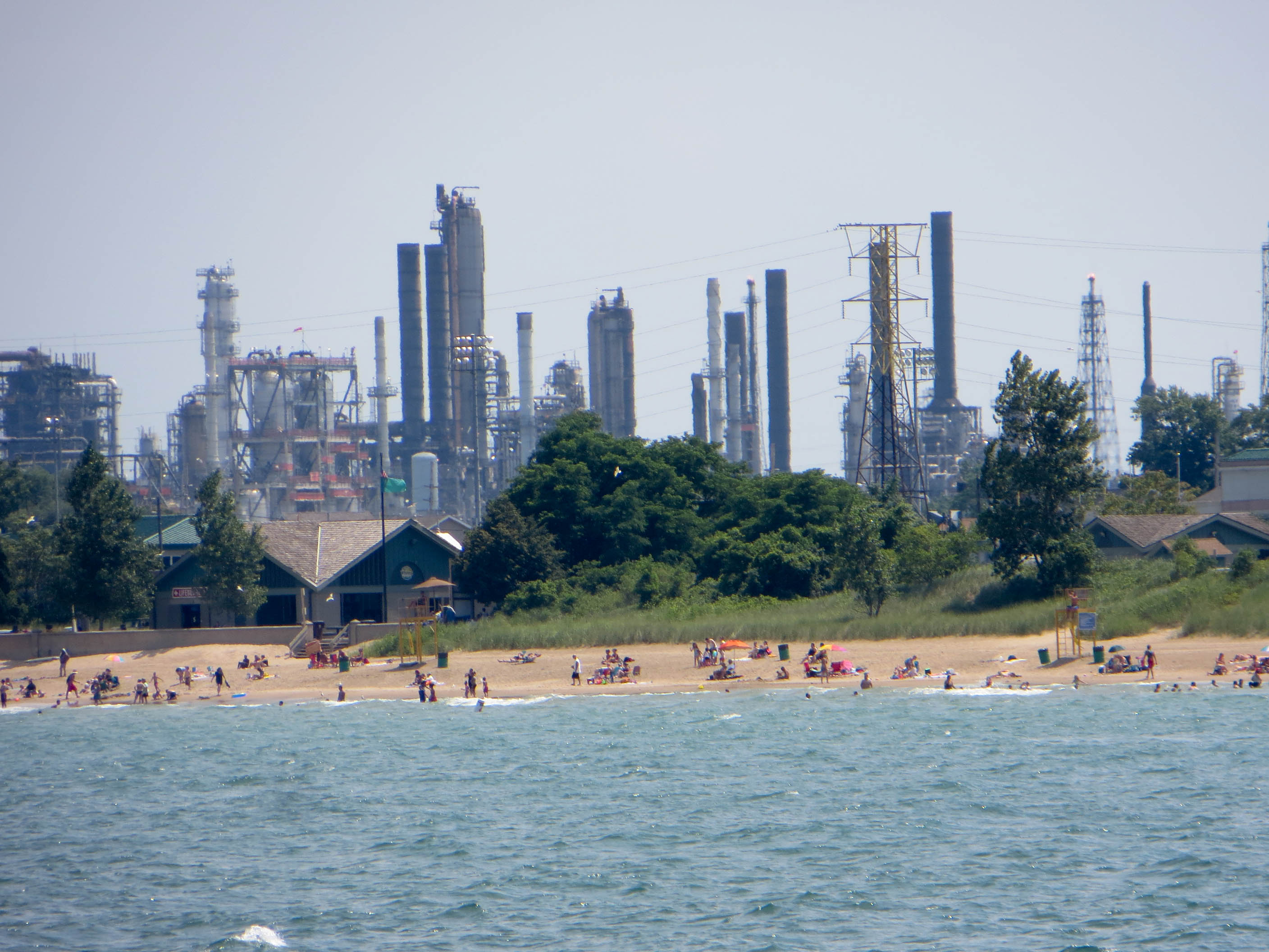 Whihala Beach - Whiting, Indiana.